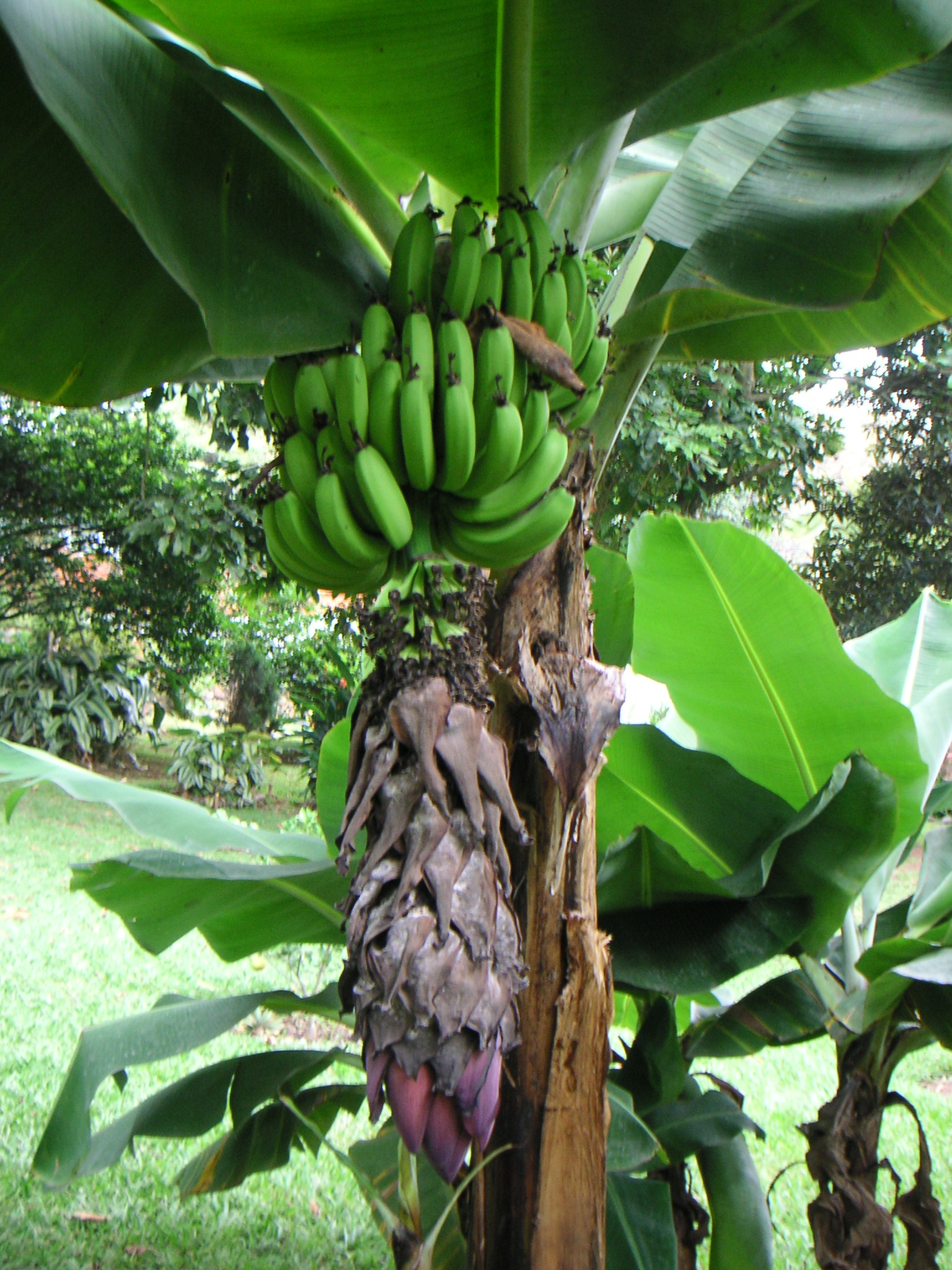 Bananenpflanze in Cali, Kolumbien